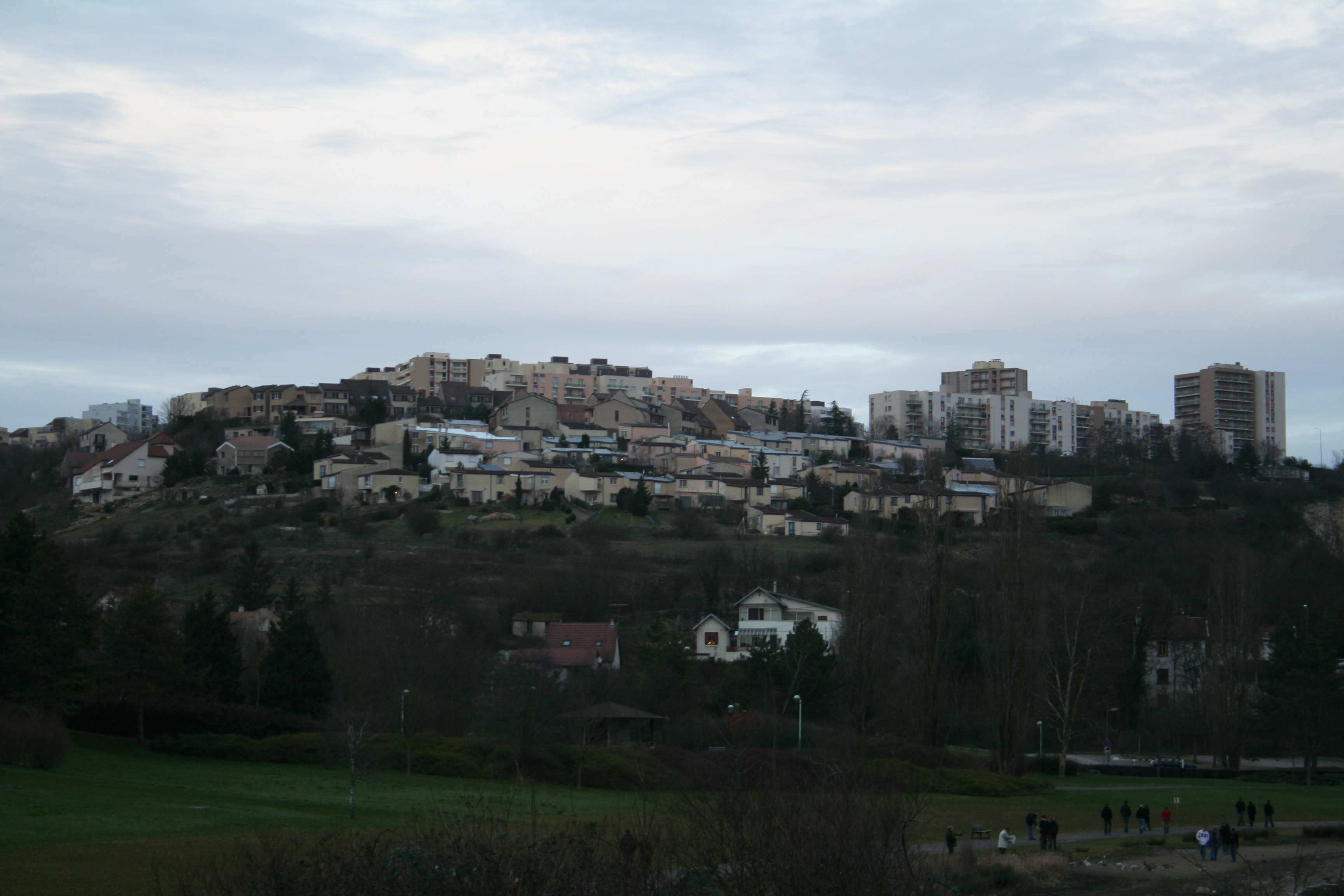 Vue de la ville de Talant, quartier Belvédère